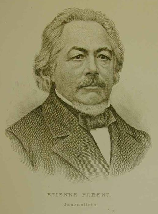 Portrait of Étienne Parent